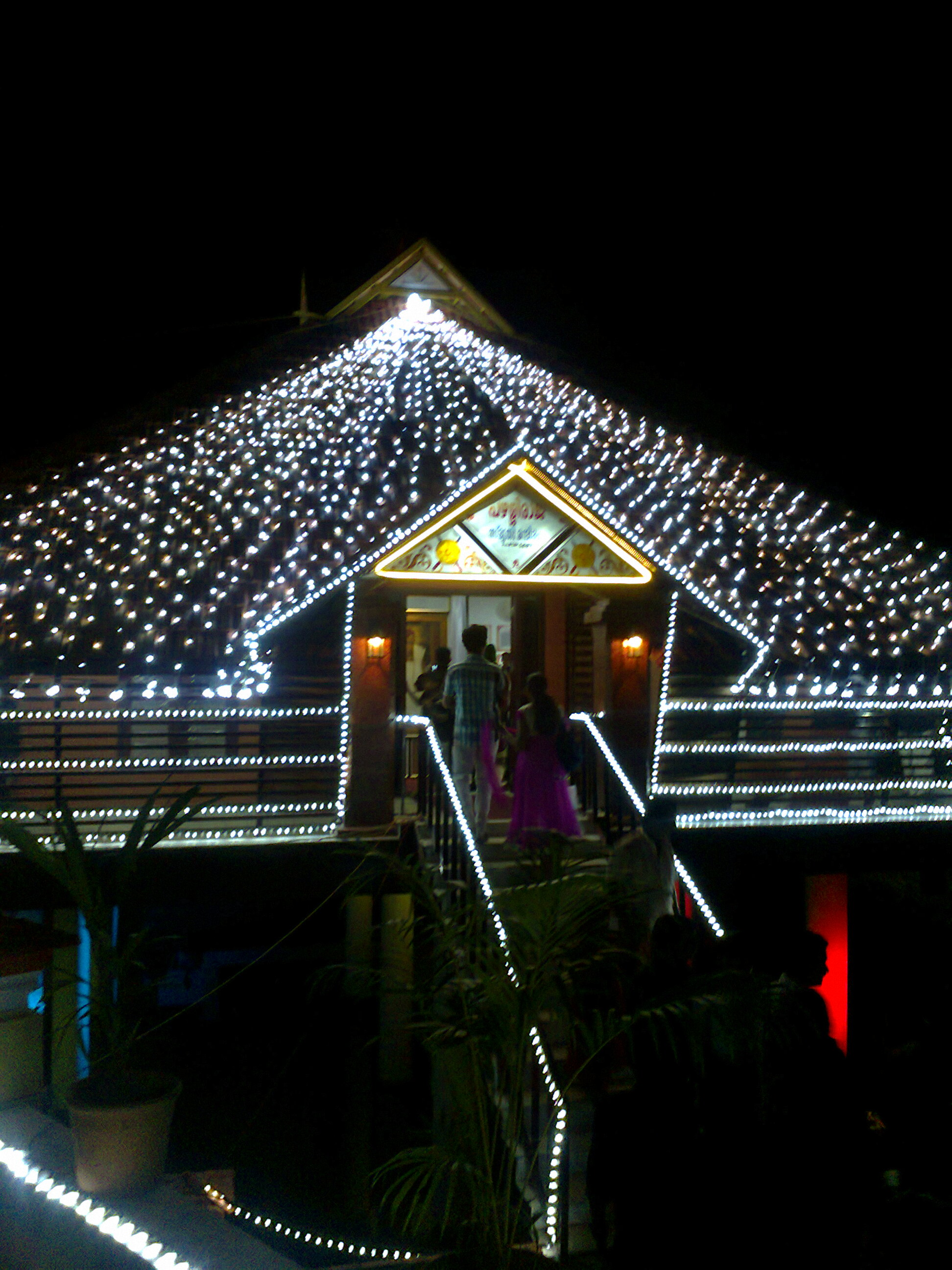 പഴശ്ശി രാജാവിന്റെ സ്മരണാർത്ഥം മട്ടന്നുരിന് സമിപം പഴശ്ശിയിൽ സ്ഥാപിച്ച പഴശ്ശി സ്മൃതി മന്ദിരം,മട്ടന്നൂർ നഗരസഭയാണ് 2014.നവംബർ.30 പഴശ്ശി രാജാവിന്റെ ചരമ ദിനത്തിൽ പഴശ്ശി സ്മൃതി മന്ദിരം നാടിന് സമർപ്പിച്ചത് .പഴശ്ശി തമ്പുരാന്റെ ജിവ ചരിത്രം അടങ്ങിയ ലേഖനങ്ങളും തമ്പുരാന്റെ ഛായാ ചിത്രവുമാണ് ഈ സ്മൃതി മന്ദിരത്തിനുള്ളിൽ ഉള്ളത്